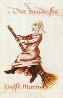 Sélection d'une miniature/ Hexenflug der "Vaudoises" (hier Hexen, ursprünglich Waldenser) auf dem Besen, Miniatur in einer Handschrift von Martin Le Franc, Le champion des dames, 1451